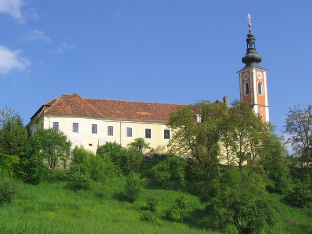 Westansicht - Schloss Sankt Georgen an der Stiefing (Stmk./Ö)